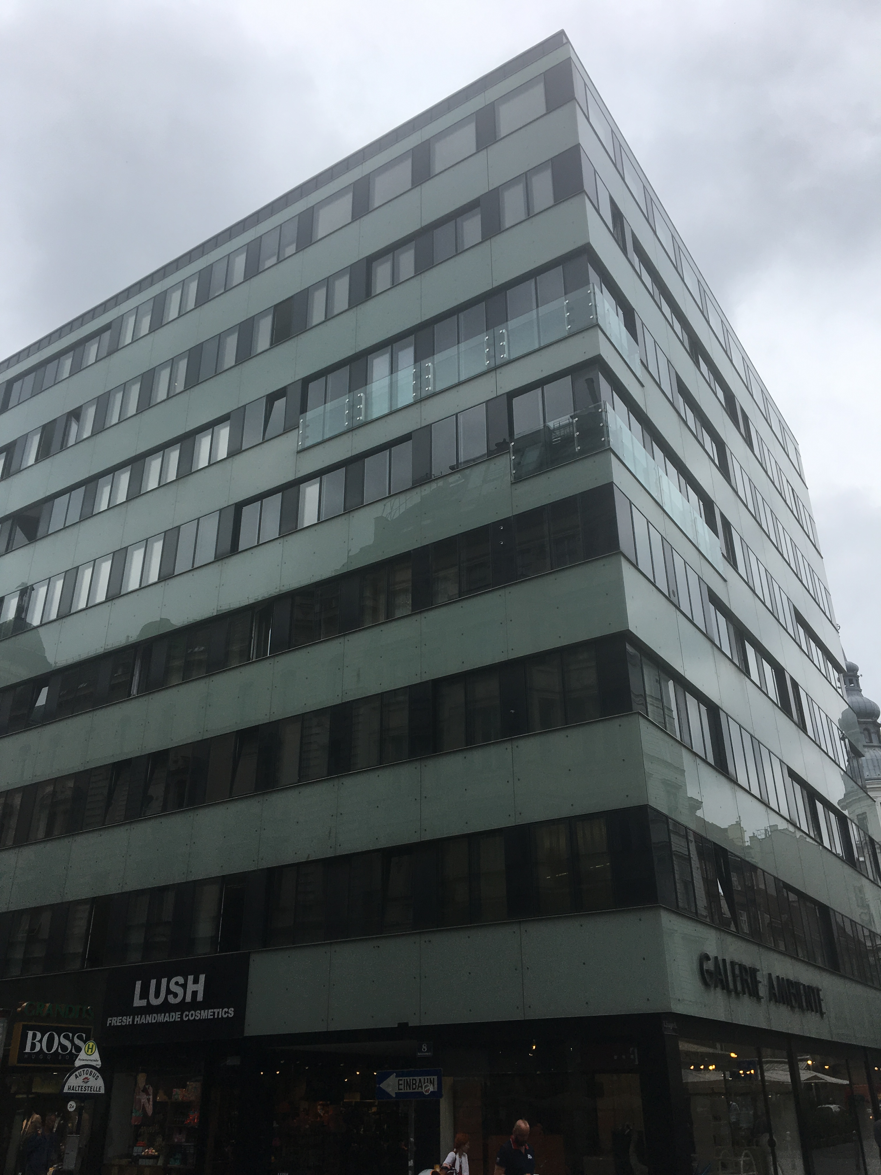 La Embajada de la República Argentina, desde su mudanza en 2017, se encuentra en ese edificio.